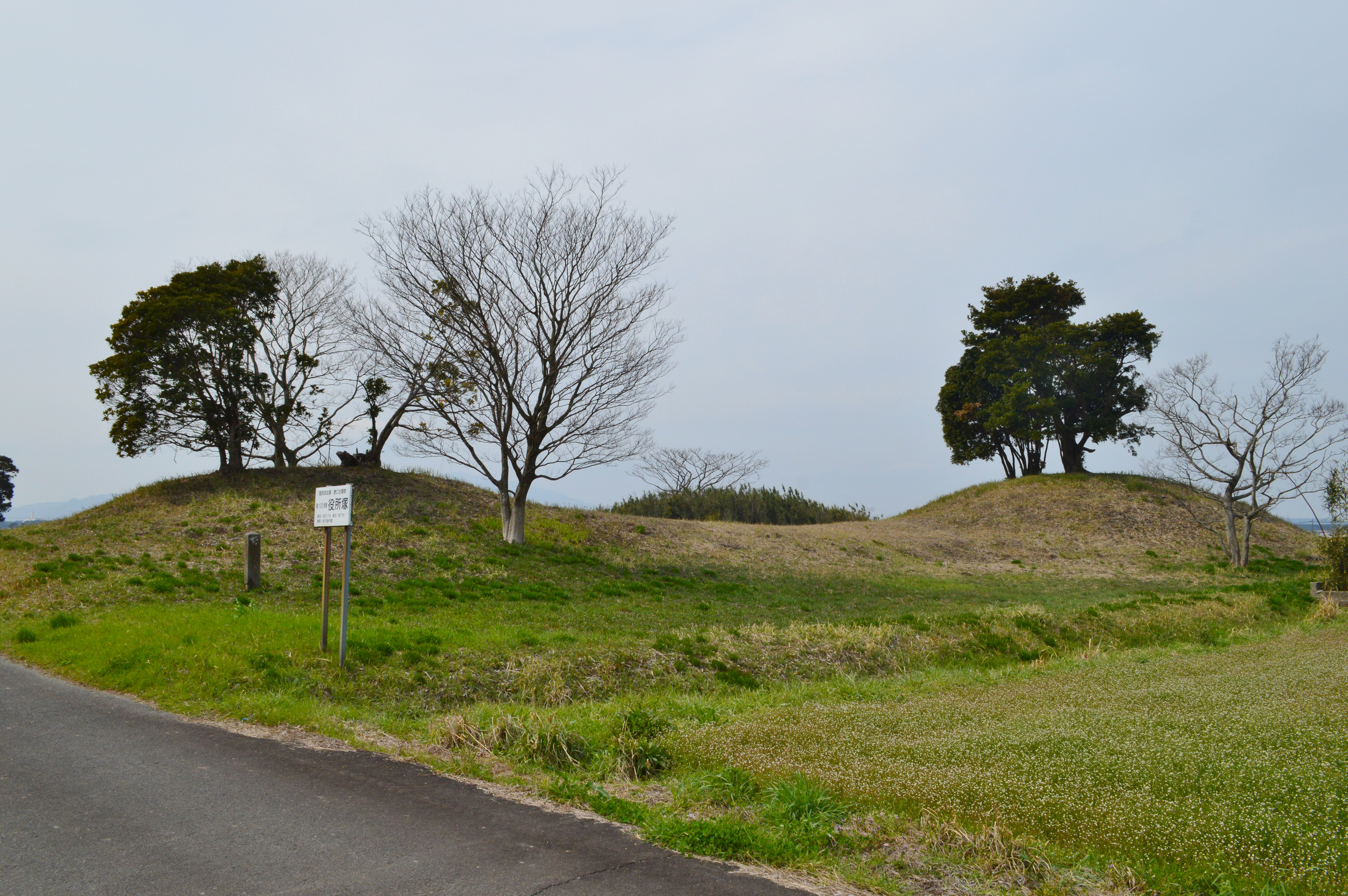 役所塚古墳 (唐仁100号墳) 墳丘全景